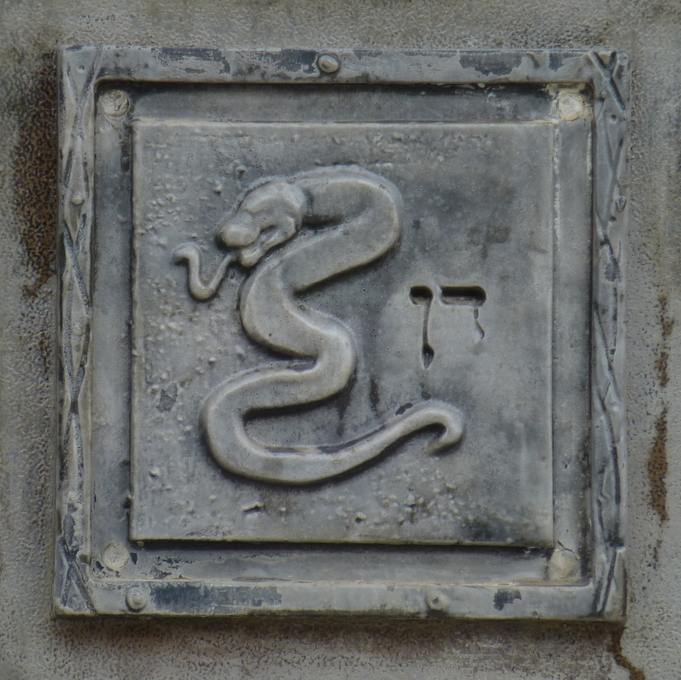 בית הכנסת הגדול "אוהל שרה" - בית הכנסת הראשון של רחובות, נבנה בשנת תרס"ד? ובהמשך שופץ והורחב והיה למוקד הקהילתי והחברתי של המושבה הצעירה.